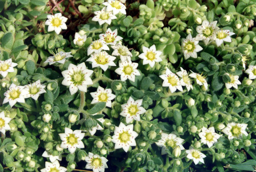 Rosularia sedoides